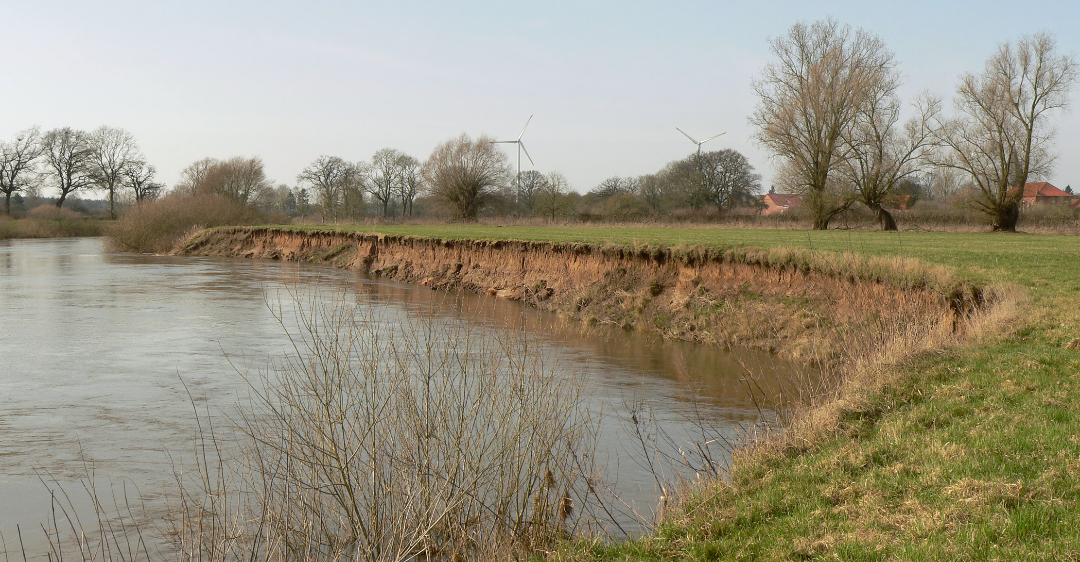 Erdabbruchkante der Leine nach Hochwasser bei Niedernstöcken